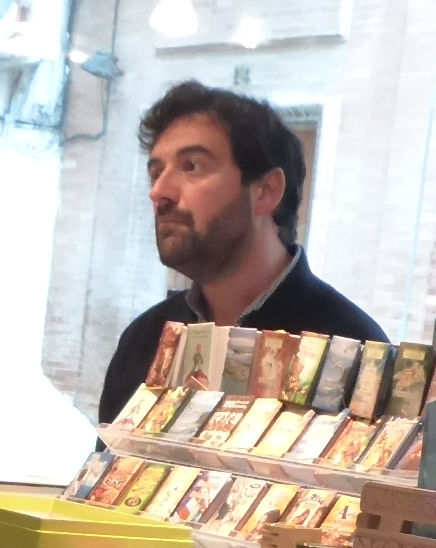 Manuel Romero Bejarano en su librería